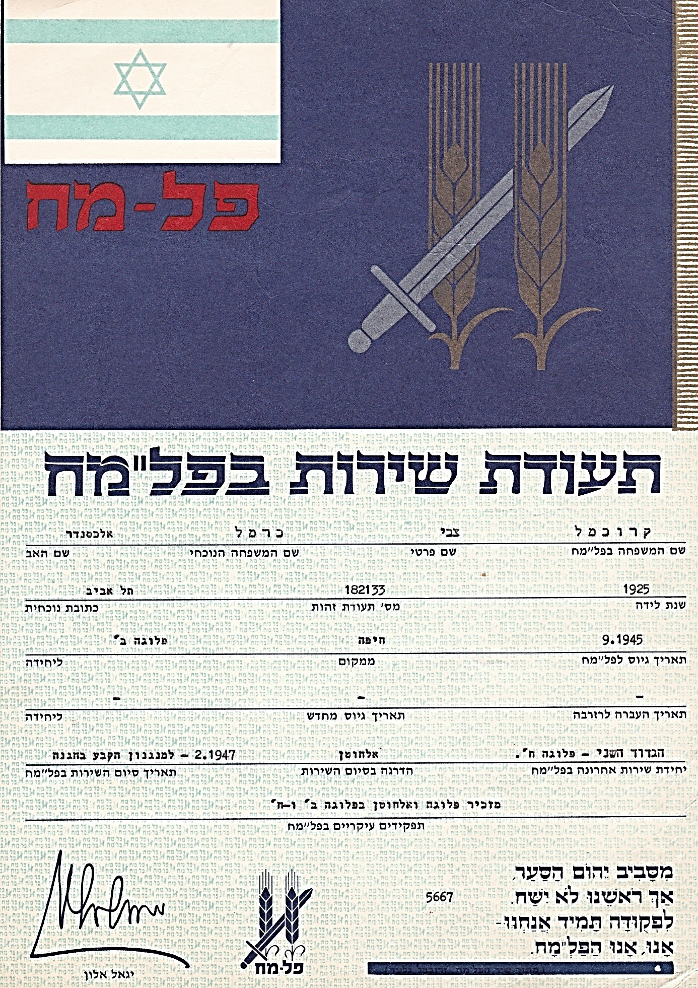 צבי כרמל, תעודת השירות בפלמ"ח